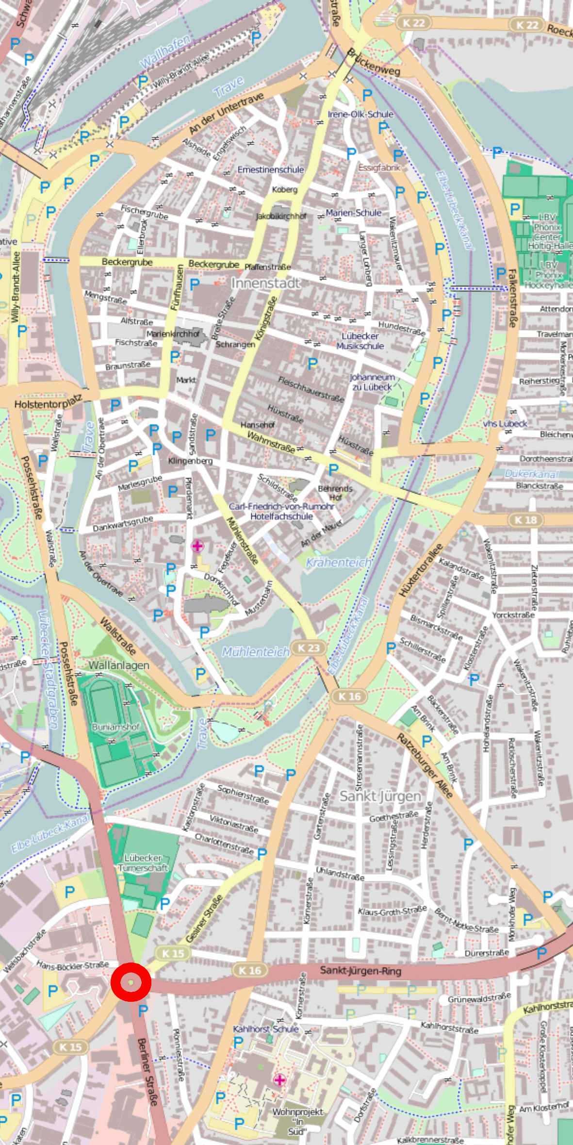 Die Lage des Berliner Platzes in Lübeck (rot hervorgehoben)